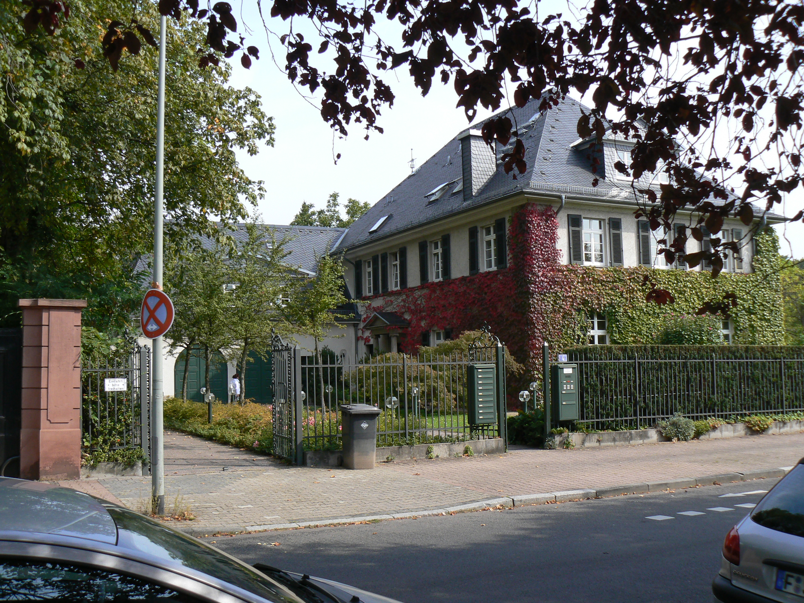 Gästehaus I der Uni Ffm. Frankfurt, Ditmarstraße 4, vormals Villa Hauck der Familie des Frankfurter Bankhauses Georg Hauck & Sohn. Der Architekt Hermann Muthesius war 1896-1903 in der deutschen Botschaft in London tätig gewesen und stand unter dem Einfluss des britischen "Arts and Crafts Movement", der Bewegung zur Belebung des Handwerks durch die Kunst. In seinen Villenbauten legte er größten Wert auf eine solide handwerkliche Ausführung des Klinkermauerwerks, der Sprossenfenster und der Schieferdeckung der steilen Dächer. Diese Villa Ditmarstraße 4 in Frankfurt am Main entspricht noch stärker dem englischen Landhausstil in der vornehmen Grundhaltung. Nach dem Krieg wurde die Villa von den Amerikanern beschlagnahmt. Nach Rückgabe verfiel die Villa. Heute wird die Villa als Gästehaus der J.W.Goethe-Universität benutzt. In zähen Verhandlungen gelang es dem Stiftungsratsvorsitzenden und Universitätspräsidenten, das Land Hessen von der Idee eines Gästehauses (für die Universität) zu überzeugen. Hessen erwarb das Grundstück von der Bundesrepublik Deutschland und stellte es der Stiftung 50 Jahre unentgeltlich zur Verfügung. Von Bund, Stadt Frankfurt und Sponsoren beschaffte die Stiftung die notwendigen Mittel für eine umfassende Sanierung und entsprechenden Ausstattung des unter Denkmalschutz stehenden Gebäudes. In 1986 war der Umbau zu Ende, es gab 10 moderne Apartments und großzügige Begegnungsräume in historischer Bausubstanz.